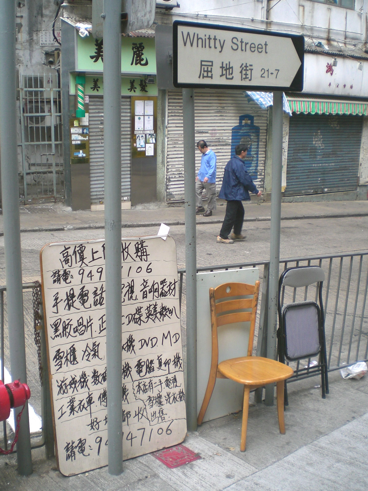 屈地街 二手貨收買者俗稱收買佬